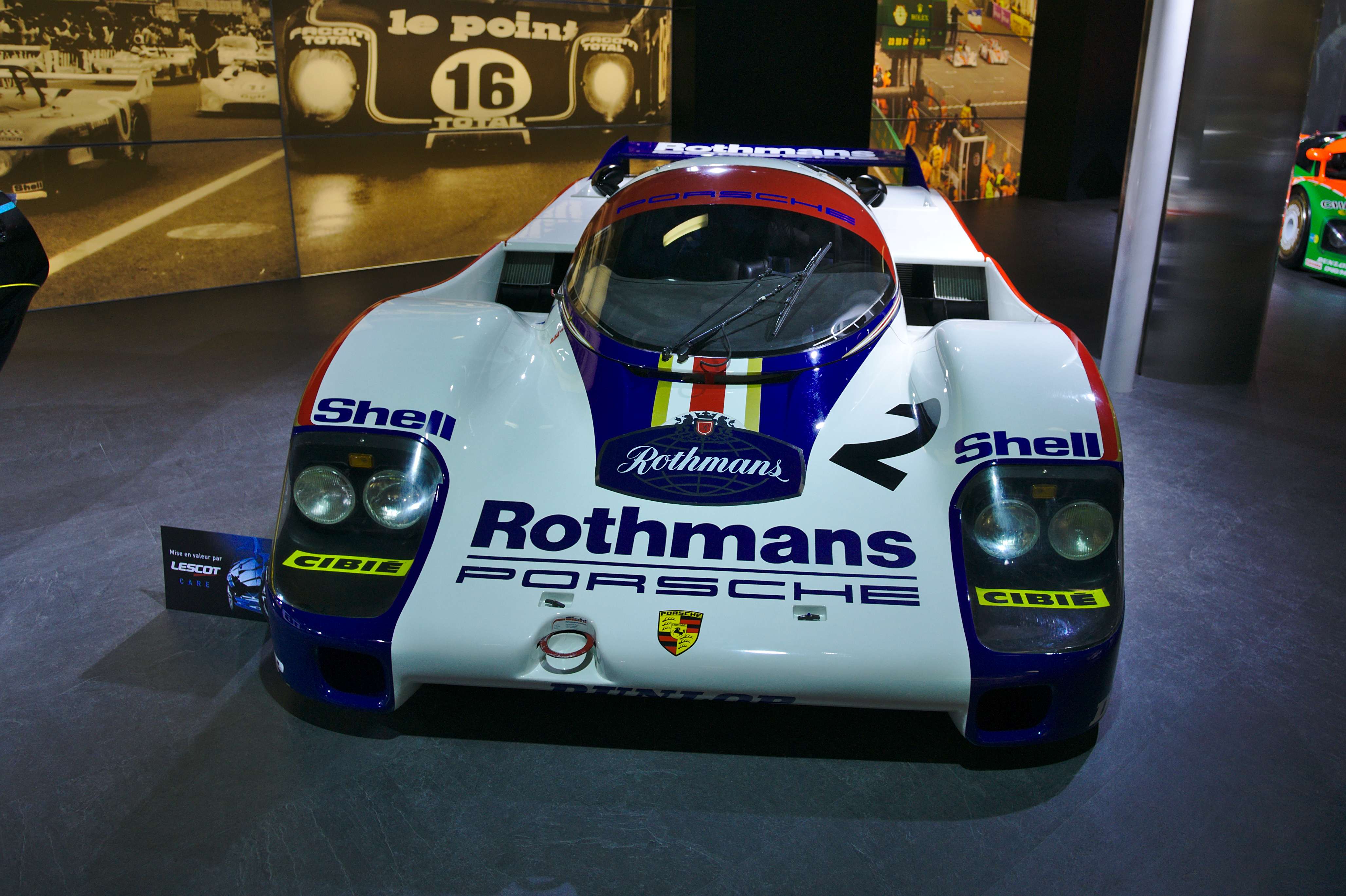 Salon de l'auto de Genève 2014 - 20140305 - Expo Le Mans